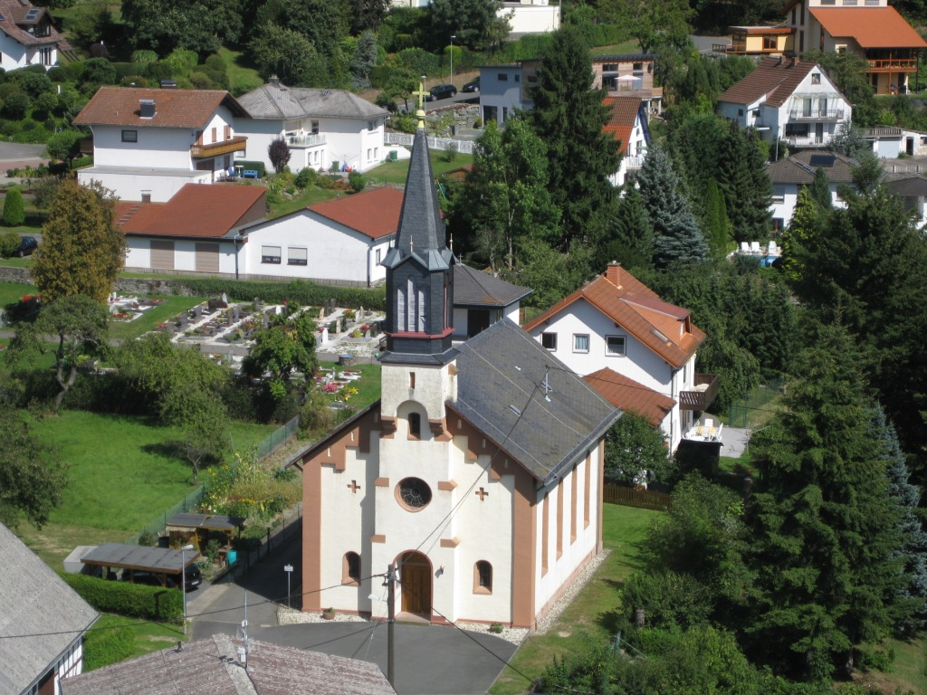 Evangelische Kirche in Alweilnau (Aufnahme vom Bergfried der Burgruine)